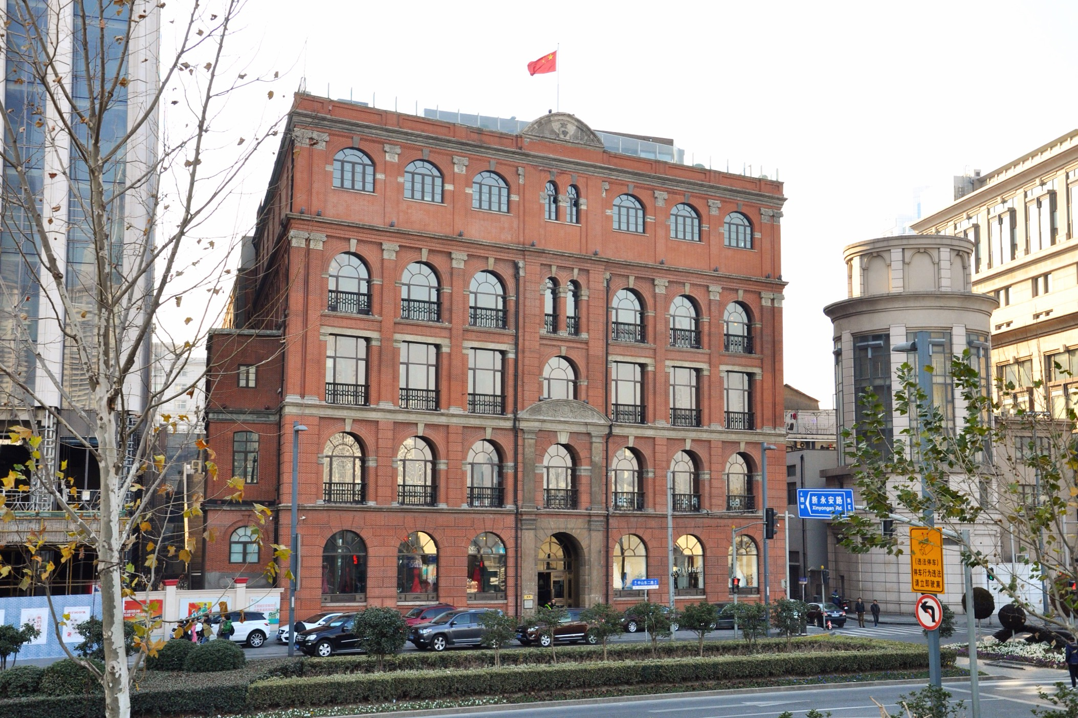 太古洋行旧址 中山东二路22号